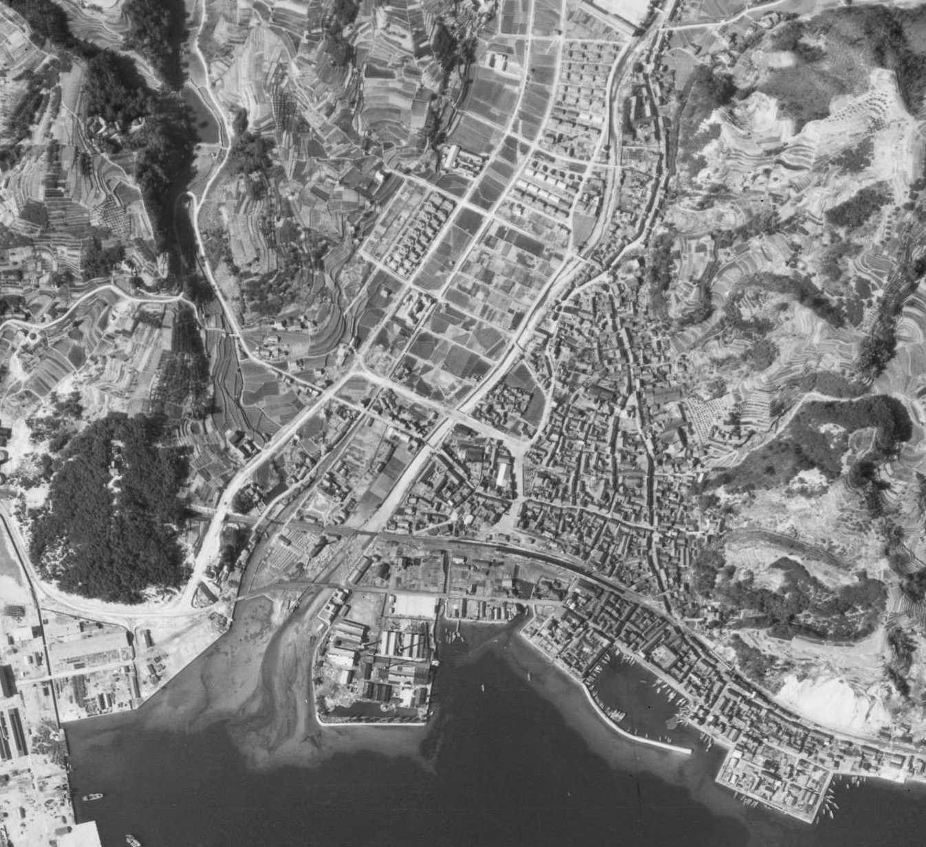 1948年の広島県東広島市安芸津町中心部